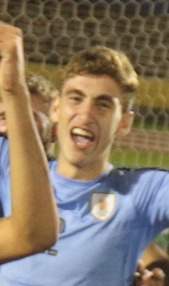 Quito 11 Feb (Andes).- Festejos y celebraciones por el triunfo del campeonato sudamericano de fútbol sub 20. La celeste uruguaya festejó la victoria del campeonato con gran emotividad. Fotografías: Carlos Rodríguez/Andes.